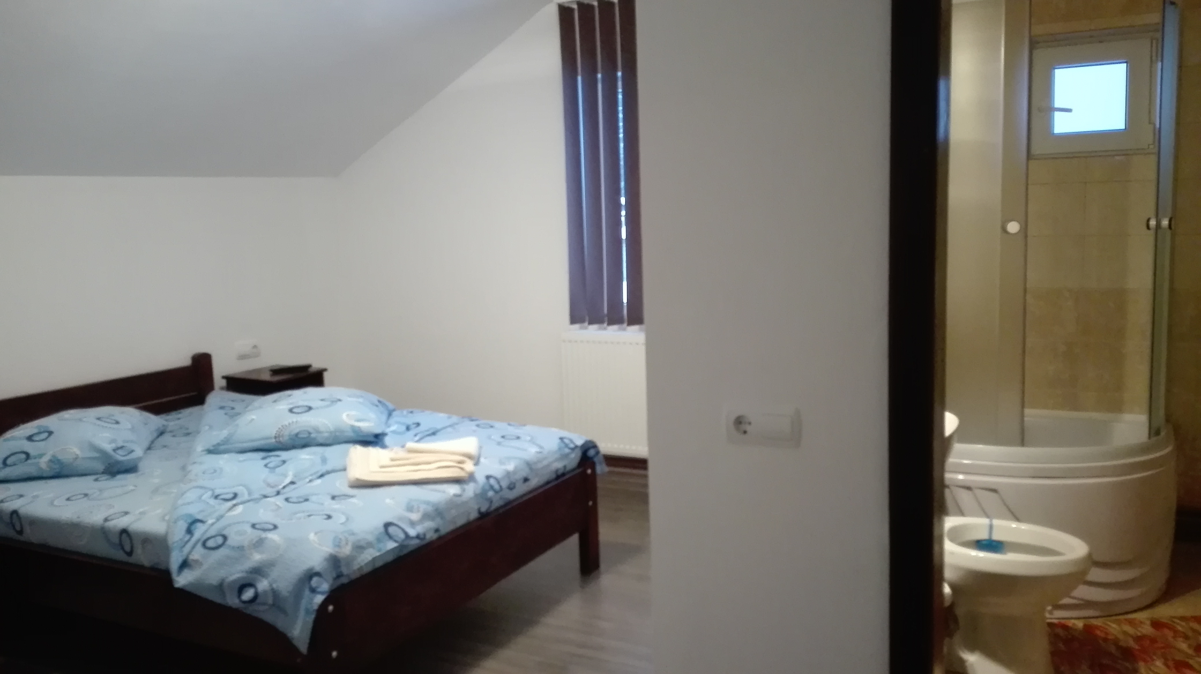 camera double